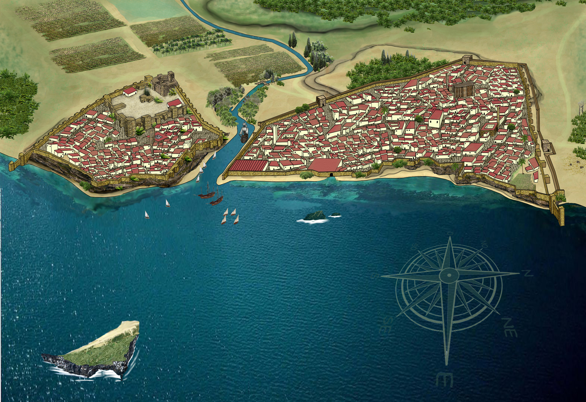 Recreación artística de la ciudad de Al Yazirat al Jadrá en su momento de máxima extensión (ca 1344). Vista desde la Bahía de Algeciras se observa en la imagen la Villa Nueva (Al-Binya) a la izquierda y la Villa Vieja (Al-Madina) a la derecha con una recreación de sus tramas urbanas y sus principales edificios. Obsérvense los cultivos asociados al río de la Miel y el puerto situado en su desembocadura. En la bahía se situaba la Isla Verde, que posiblemente tuviera construcciones en su interior, y varios arrecifes rocosos en la costa, entre ellas la Piedra Galera y la Piedra Galerilla.